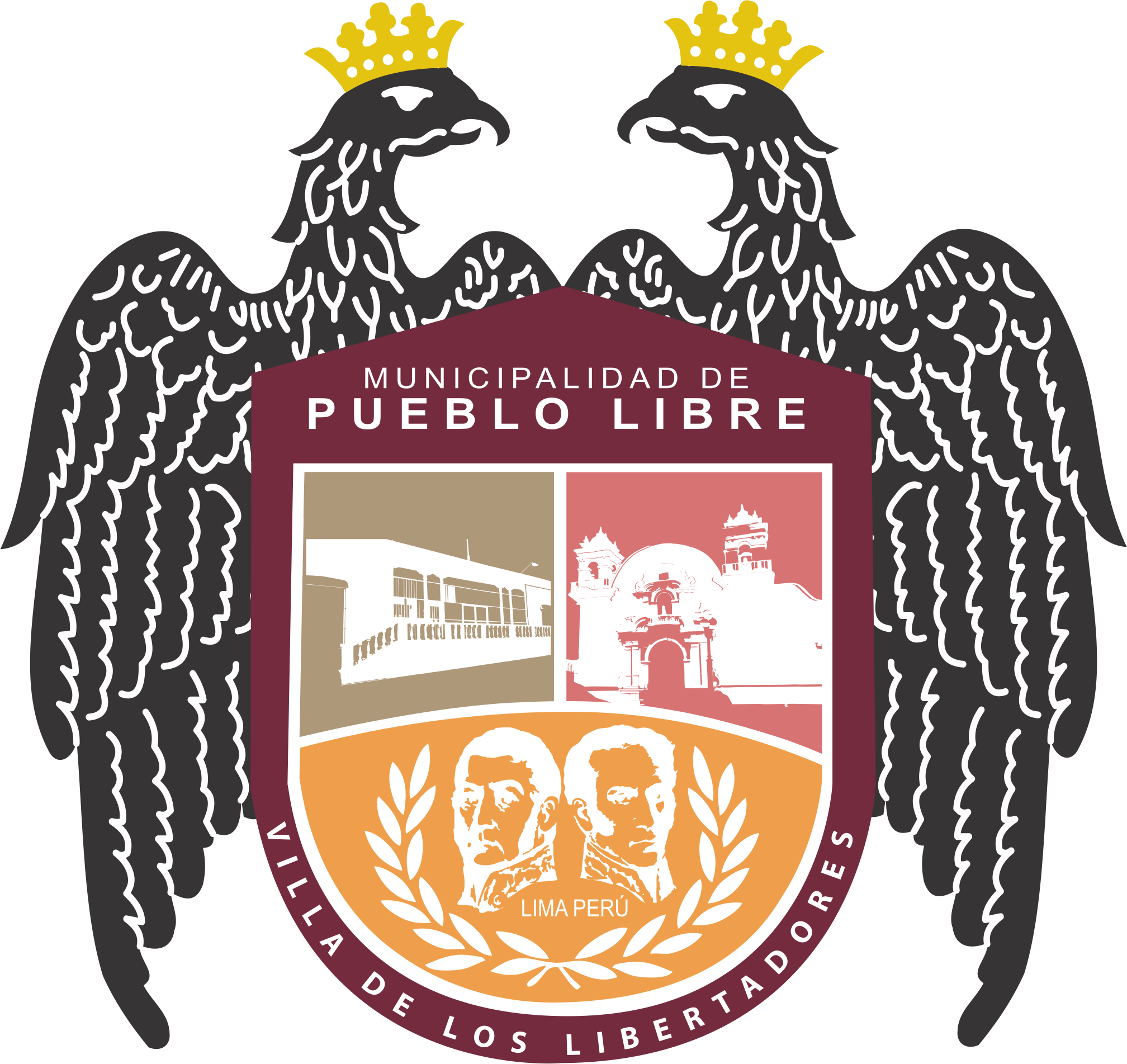 Logo Municipalidad de Pueblo Libre